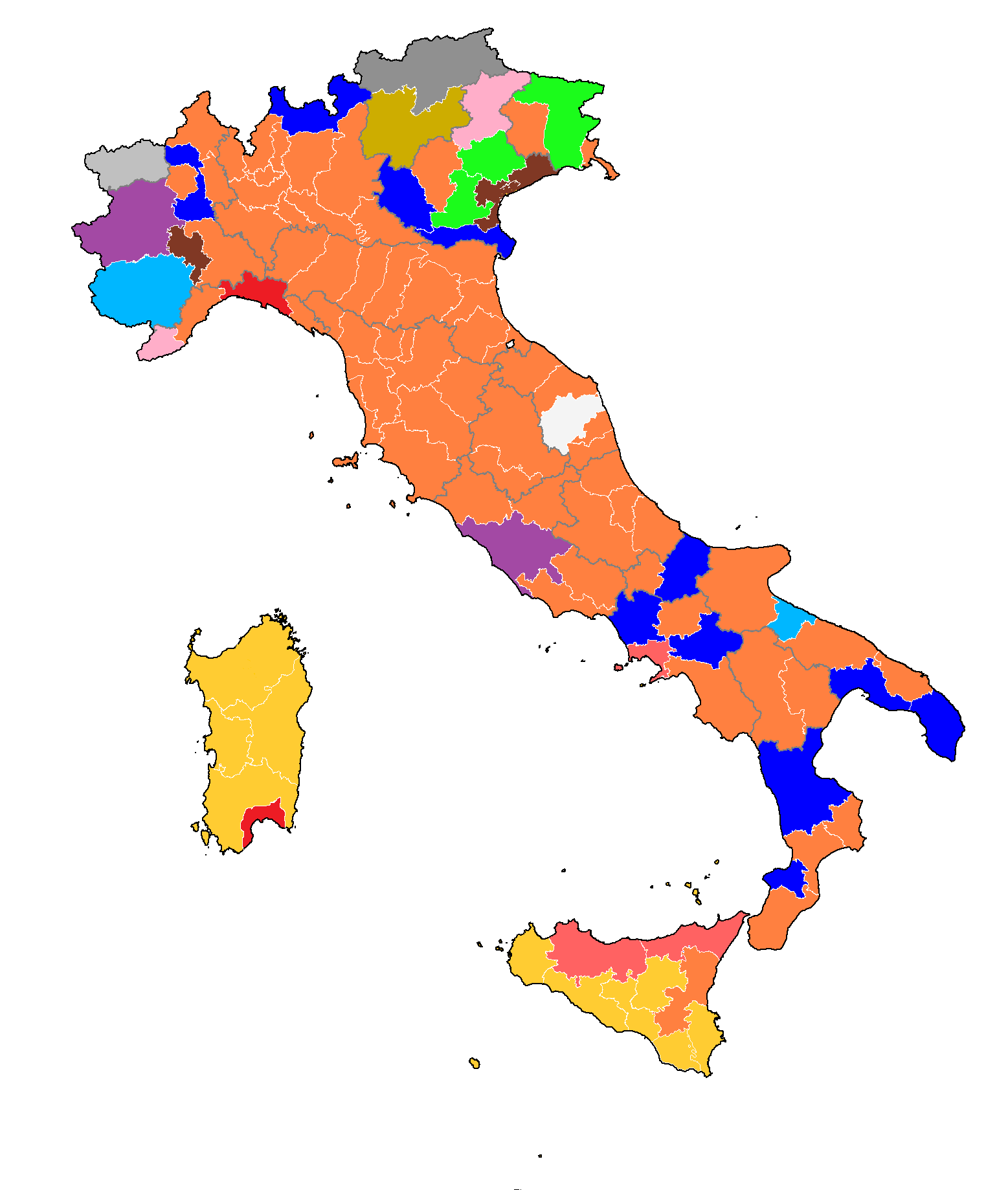 mappa aggiornata al 2016 sull'appartenenza politica dei presidenti delle province/città metropolitane. L'immagine rappresenta l'appartenenza politica degli attuali presidenti delle 110 province italiane (situazione del 26 giugno 2016). Partito Democratico Forza Italia Lega Nord Unione di Centro Movimento 5 Stelle Partito Socialista Italiano Südtiroler Volkspartei Partito Autonomista Trentino Tirolese Union Valdôtaine Indipendenti di Centro Destra Italia dei Valori e Indipendenti di Centro Sinistra Province commissariate